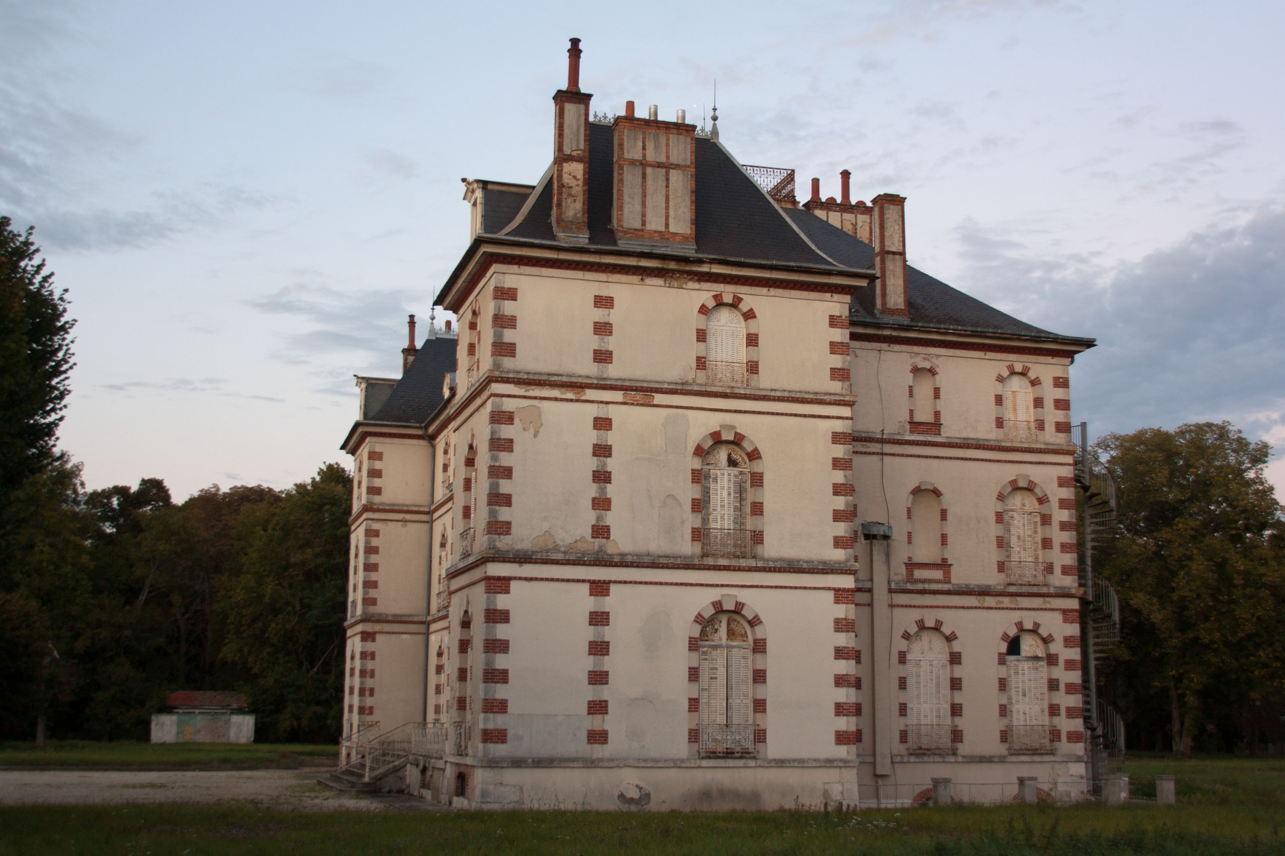 Château de la Valette, Pressigny-les-Pins, Loiret, France